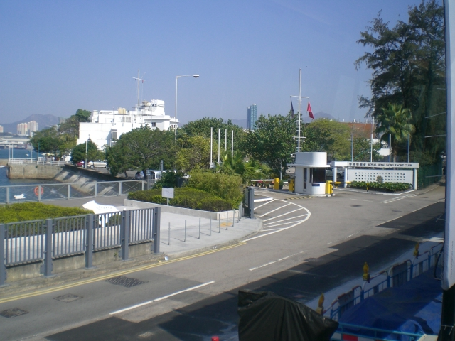 灣仔北鴻興道香港遊艇會, Royal Hong Kong Yacht Club